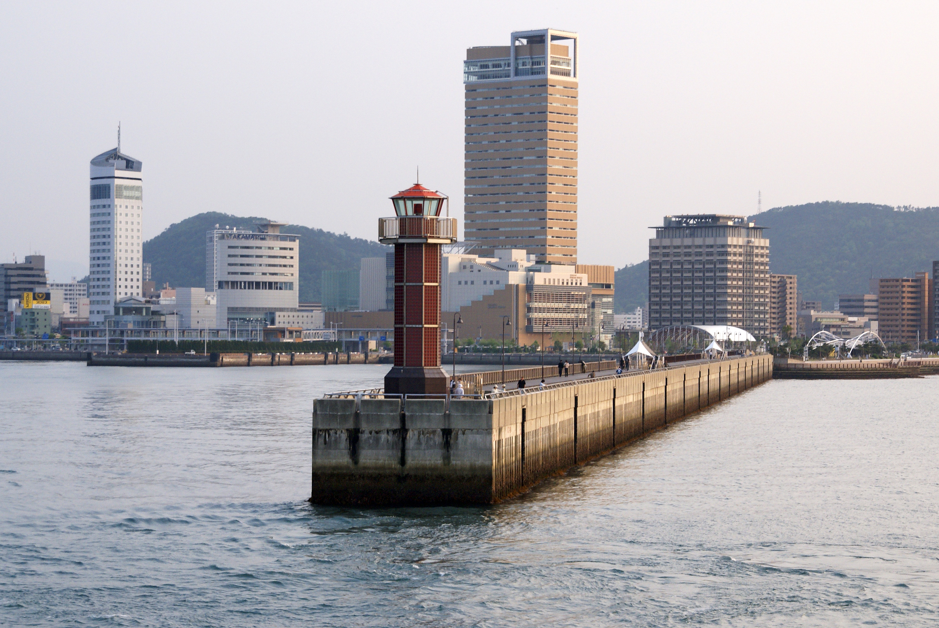 Sunport Takamatsu, Kagawa prefecture, Japan